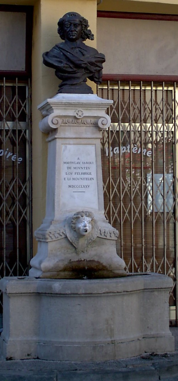 Fontaine Nicolas Saboly à Monteux dans le Vaucluse